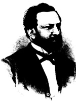 Belgian entomologist Félicien Chapuis (1824-1879)